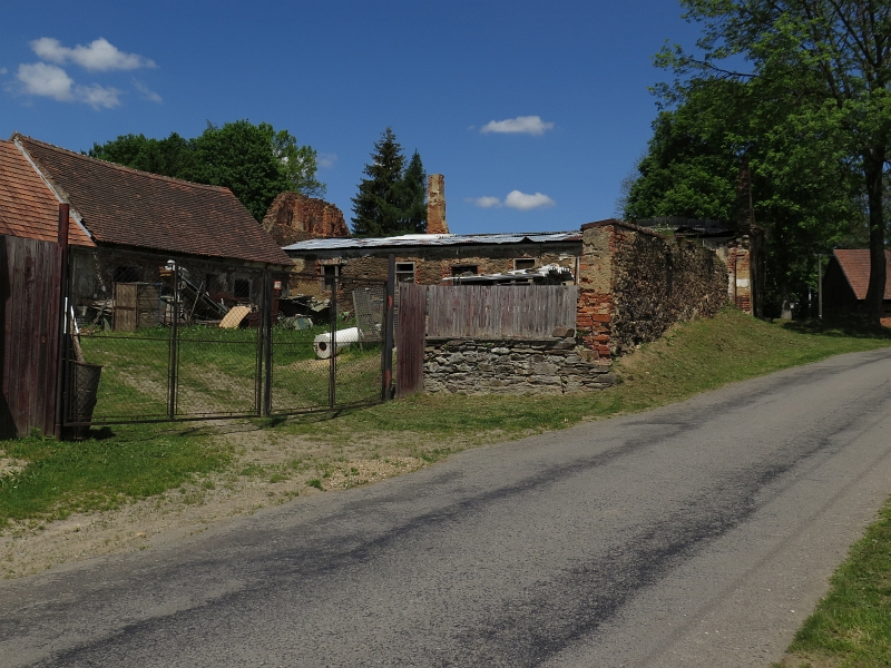 Fara, Zhoř 1, Zhoř (Pacov).